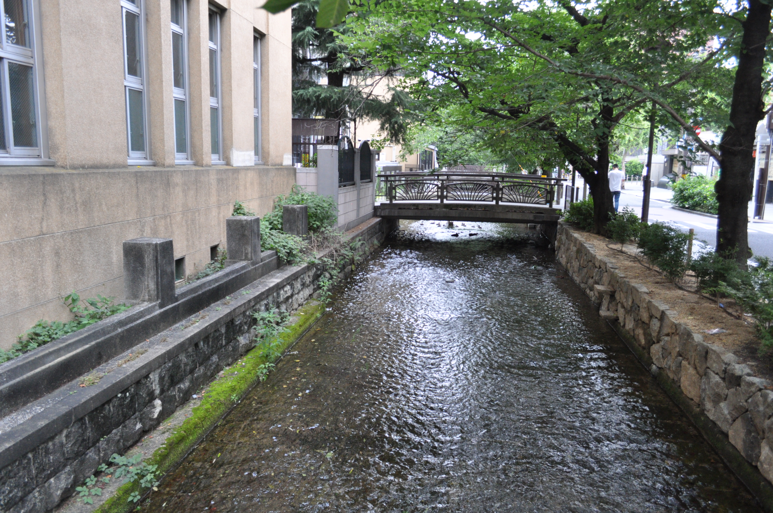 京都市立立誠小学校